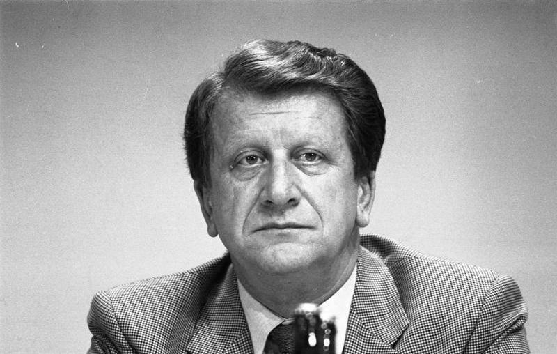 2.-5.11.1981 30. Bundesparteitag der CDU in Hamburg im Congress Centrum